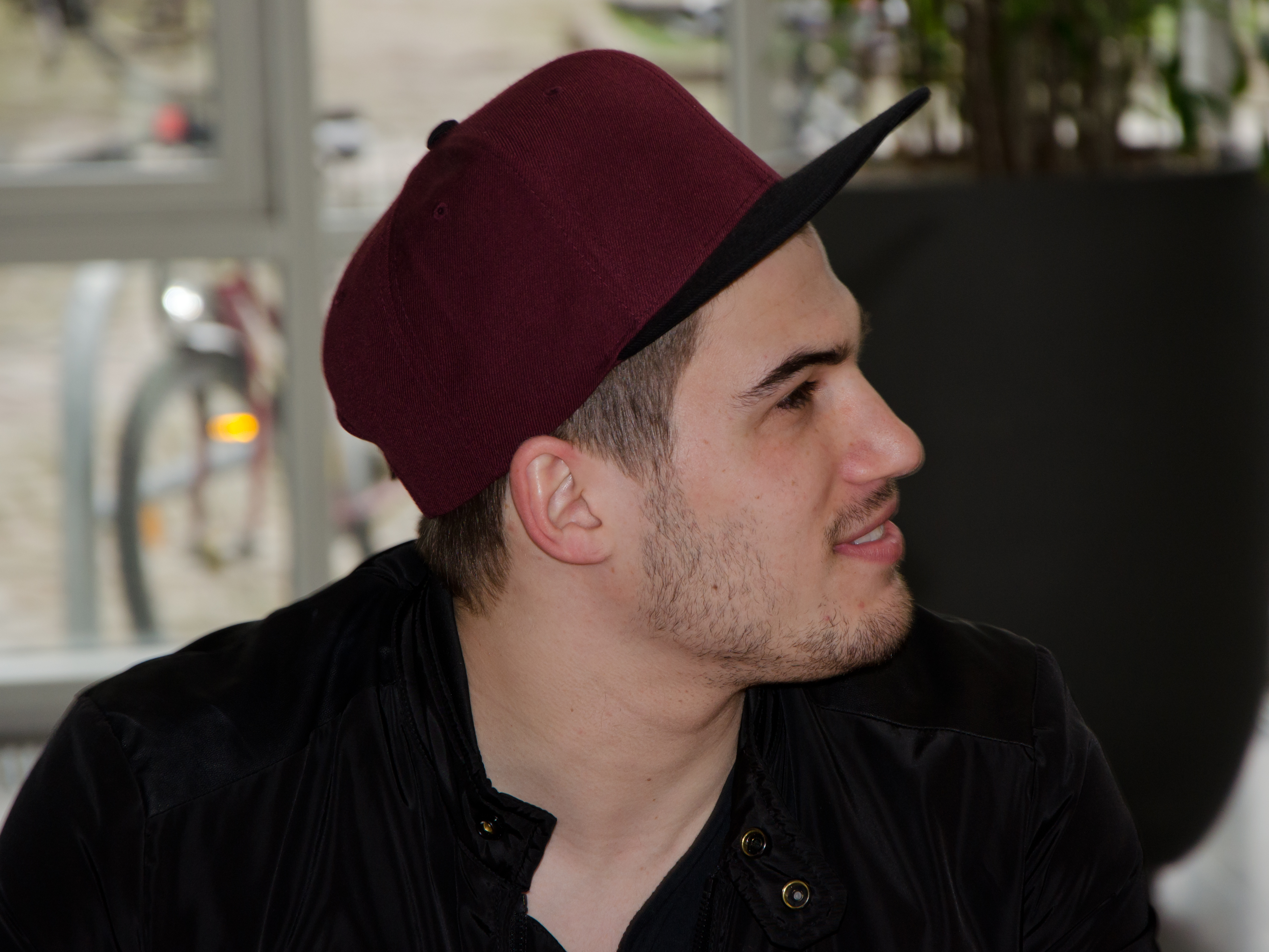 Dominic Sanz bei einer Autogrammstunde in Hamburg